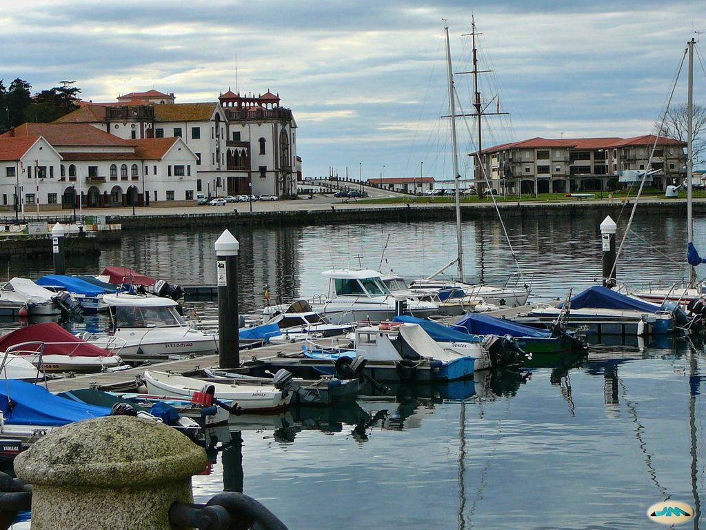 Marín, Escola Naval